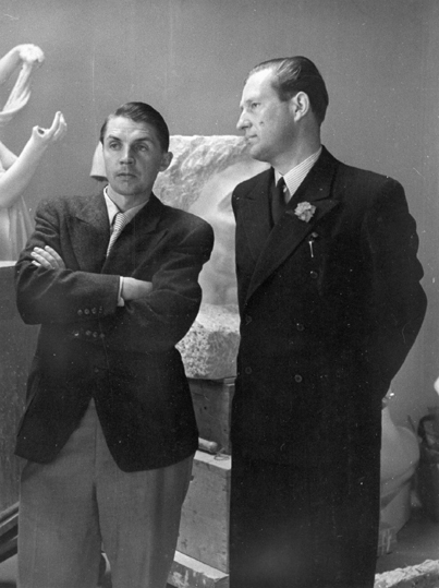 Jälleenrakennustoimiston vierailu Saksassa. Kuvassa Jälleenrakennustoimiston johtaja Viljo Revell (oik.) ja Standardisoimislaitoksen johtaja Aarne Ervi.